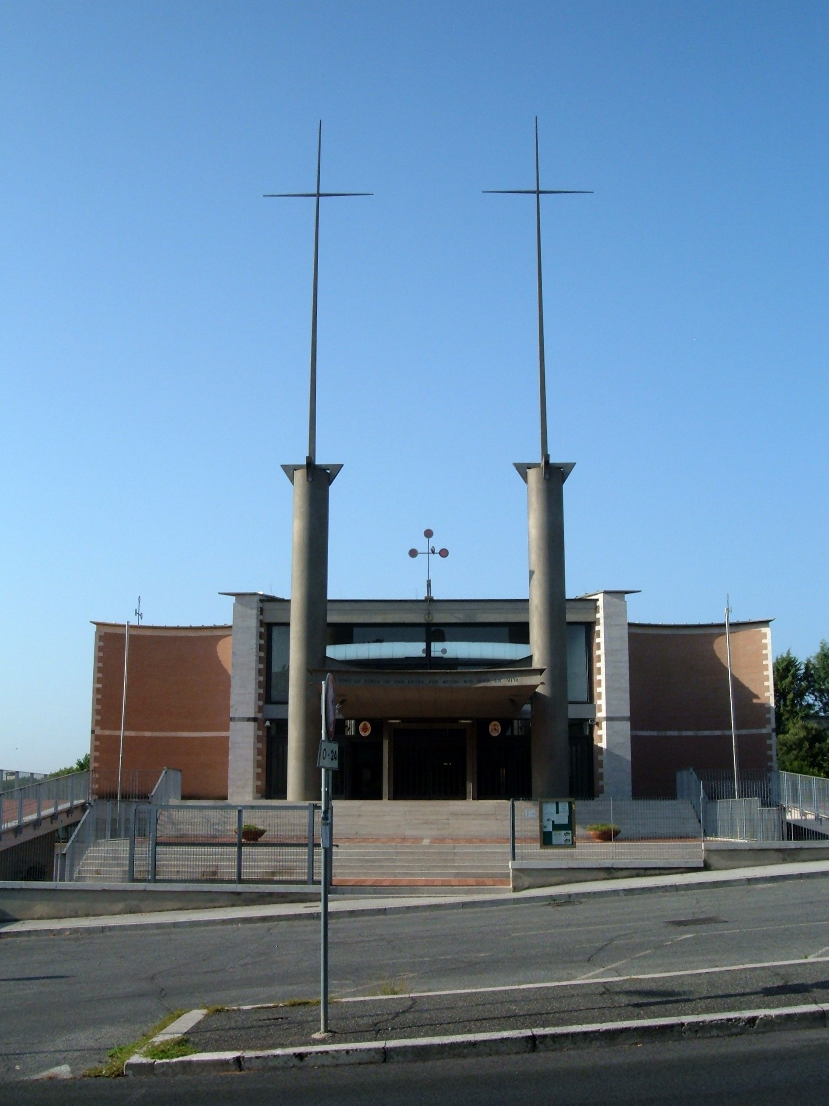 Chiesa di San Liborio, a Roma, nel quartiere Monte Sacro Alto, in via Diego Fabbri.